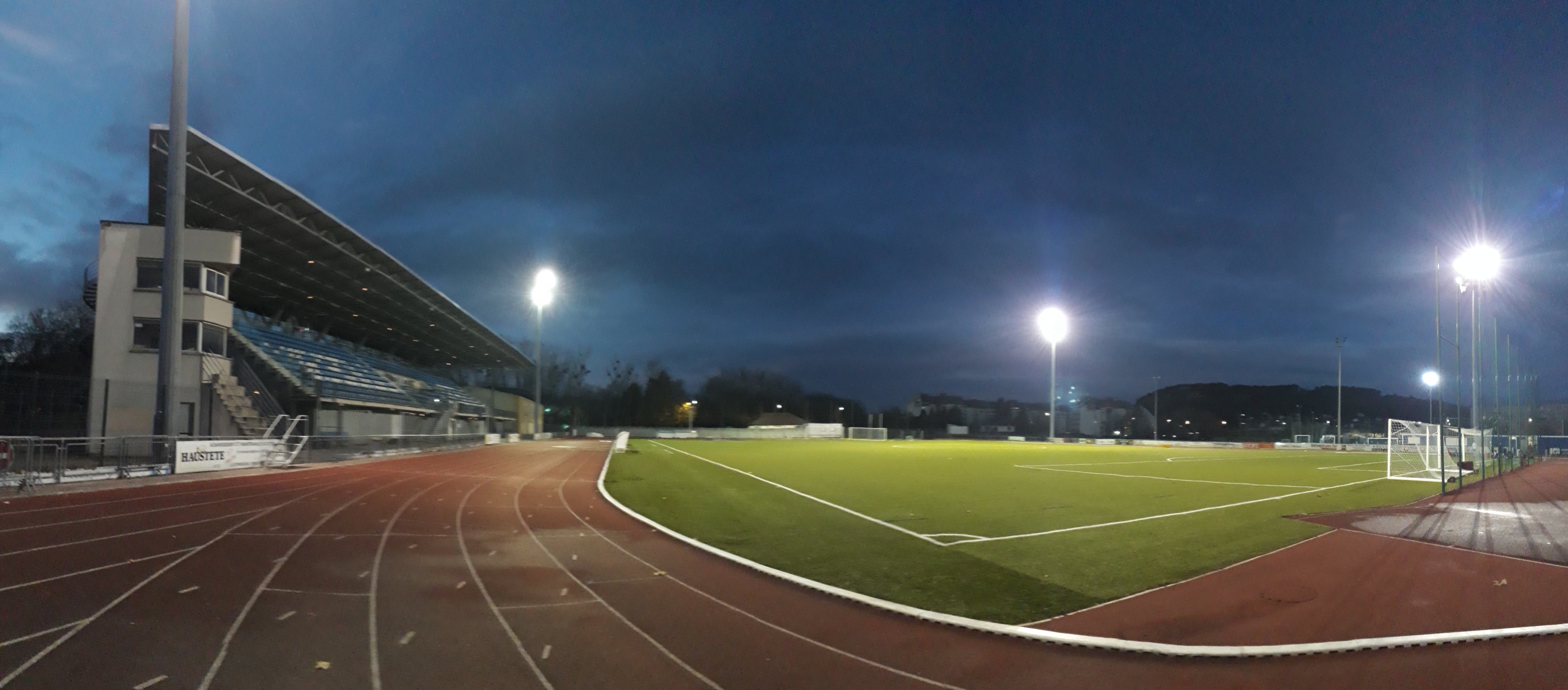 Stade René-Hologne de Vesoul - 27 novembre 2019